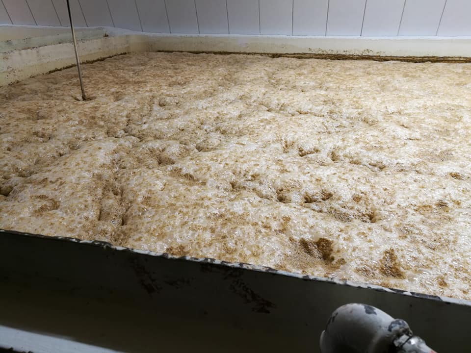 Zamkowy Brewery in Cieszyn Poland